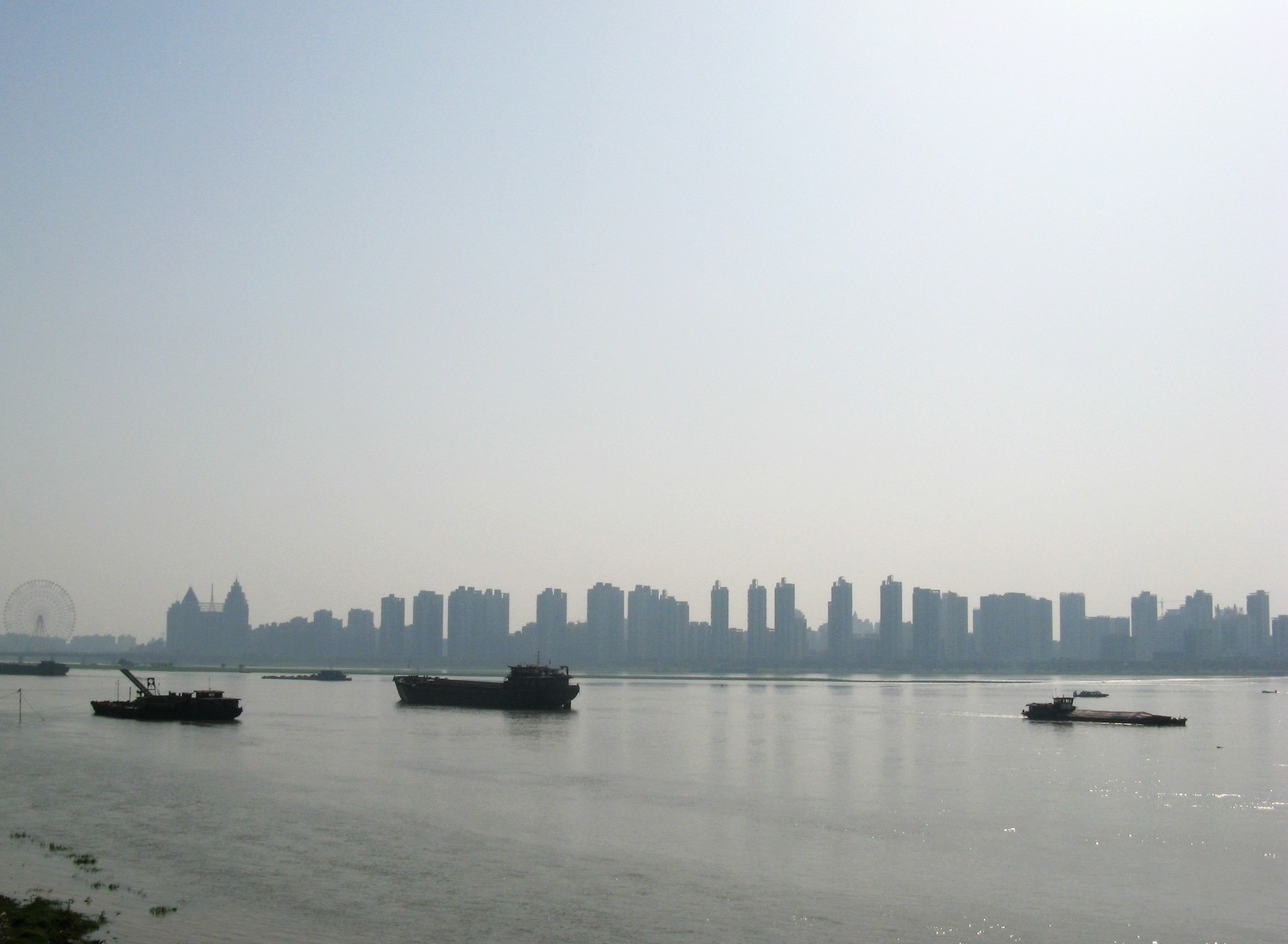 赣江，南昌 NanChang, JiangXi Province 22/04/12